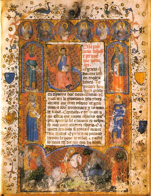 Crònica dels reys dArago e Comtes de Barcelona